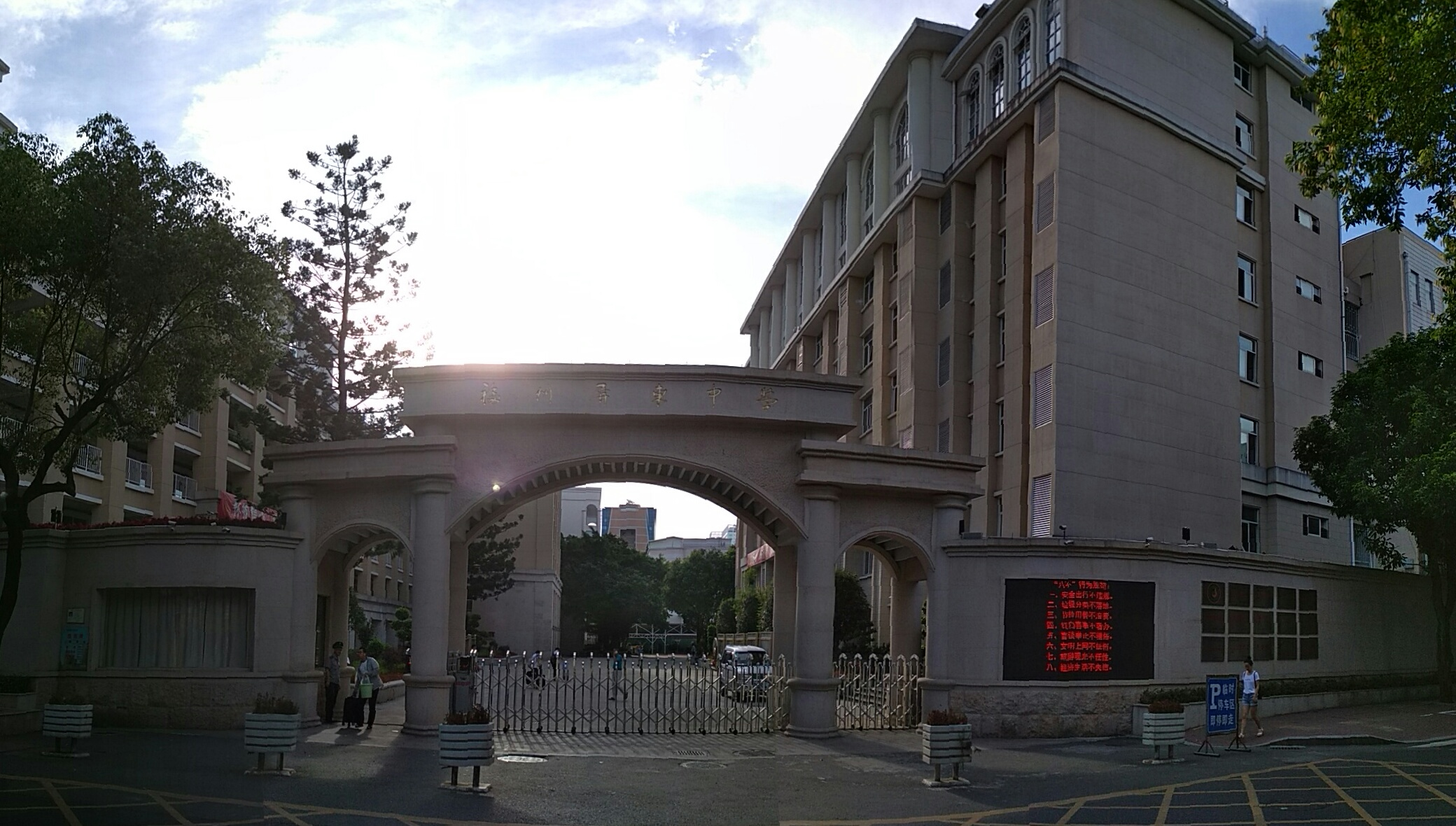 福州屏东中学正门，左为传达室，电子屏幕右为学校之荣誉墙。校内左为初中教学楼致远楼，右为高中教学楼弘远楼。丁酉季夏摄。